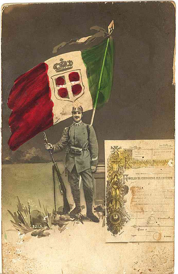 Italia 1915 coscritto della Prima Guerra Mondiale